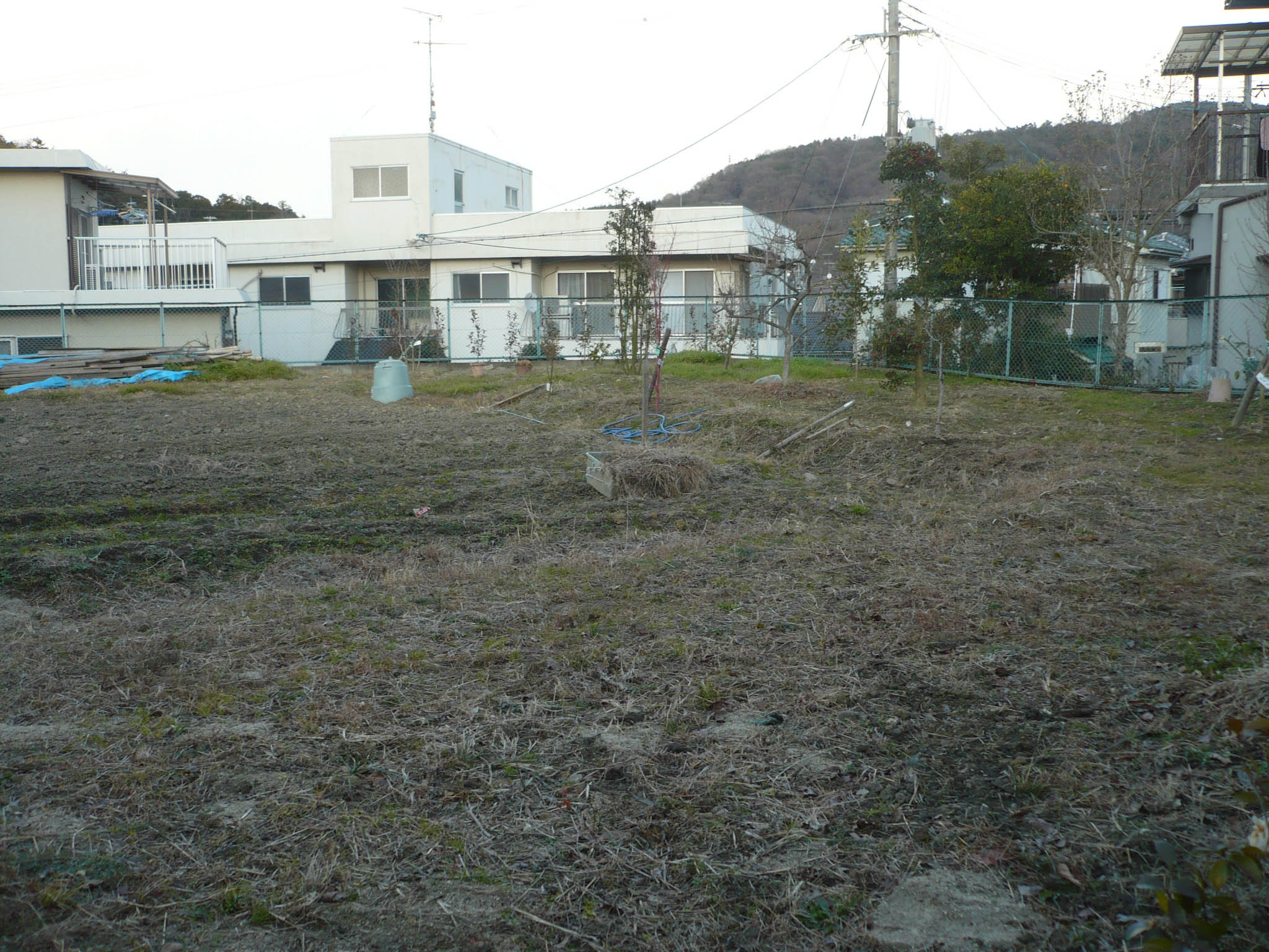 新田城の主郭